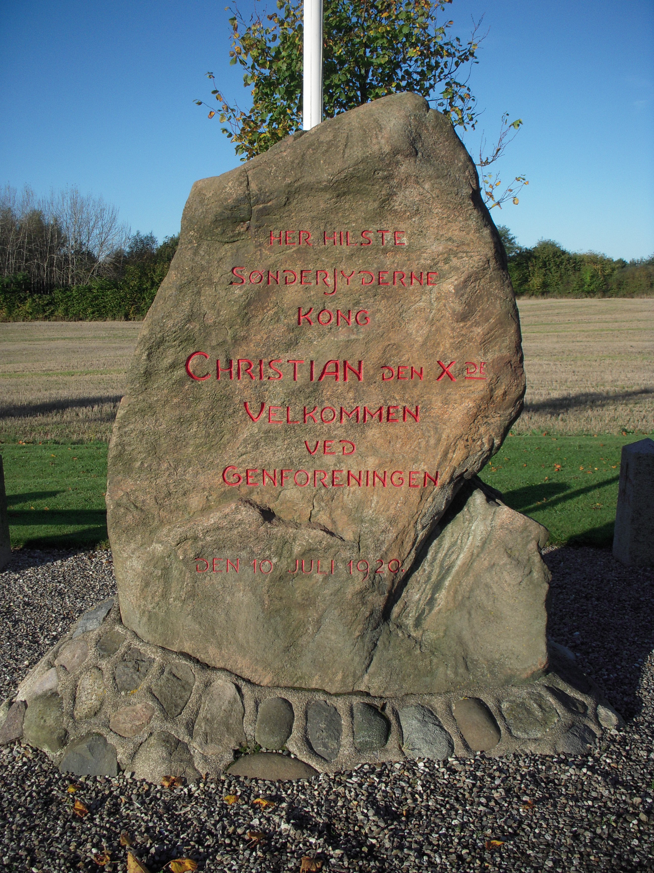 Mindesten umiddelbart syd for den gamle grænsekro på Koldingvej nord for Christiansfeld. Det var her, de "hjemvendte" sønderjyder stod og tog imod Christian X ved Genforeningen i 1920.